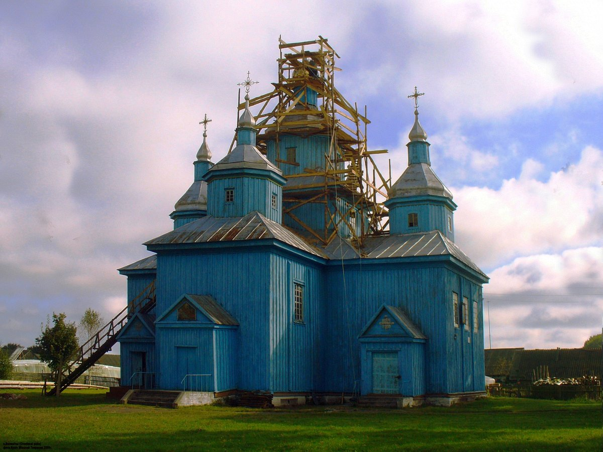 Велямічы. Ільінская царква са званіцай. Антырэстаўрацыя